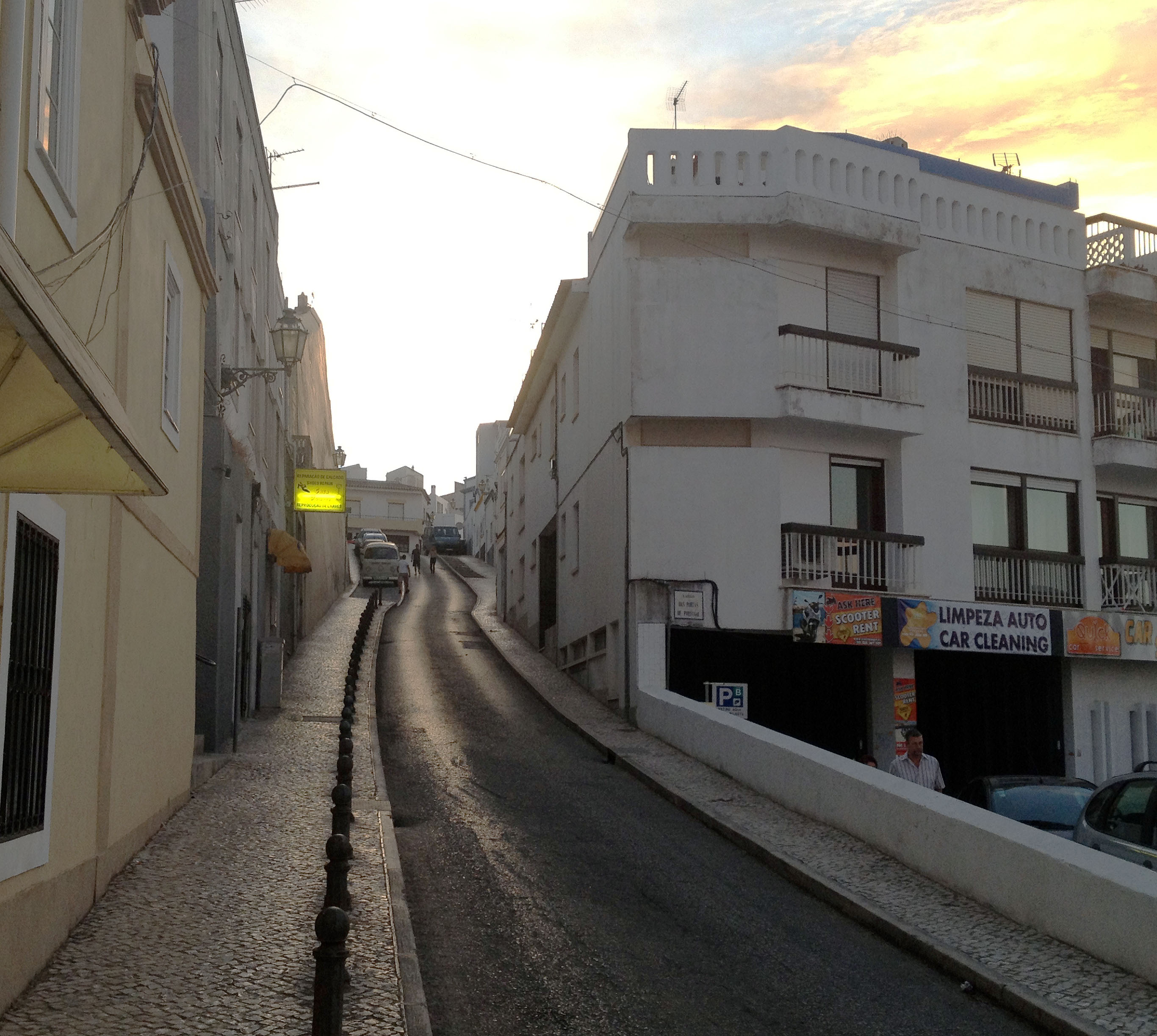 Синтра, Португалия. Lagos, Rua da Capelinha / Largo das Portas de Portugal